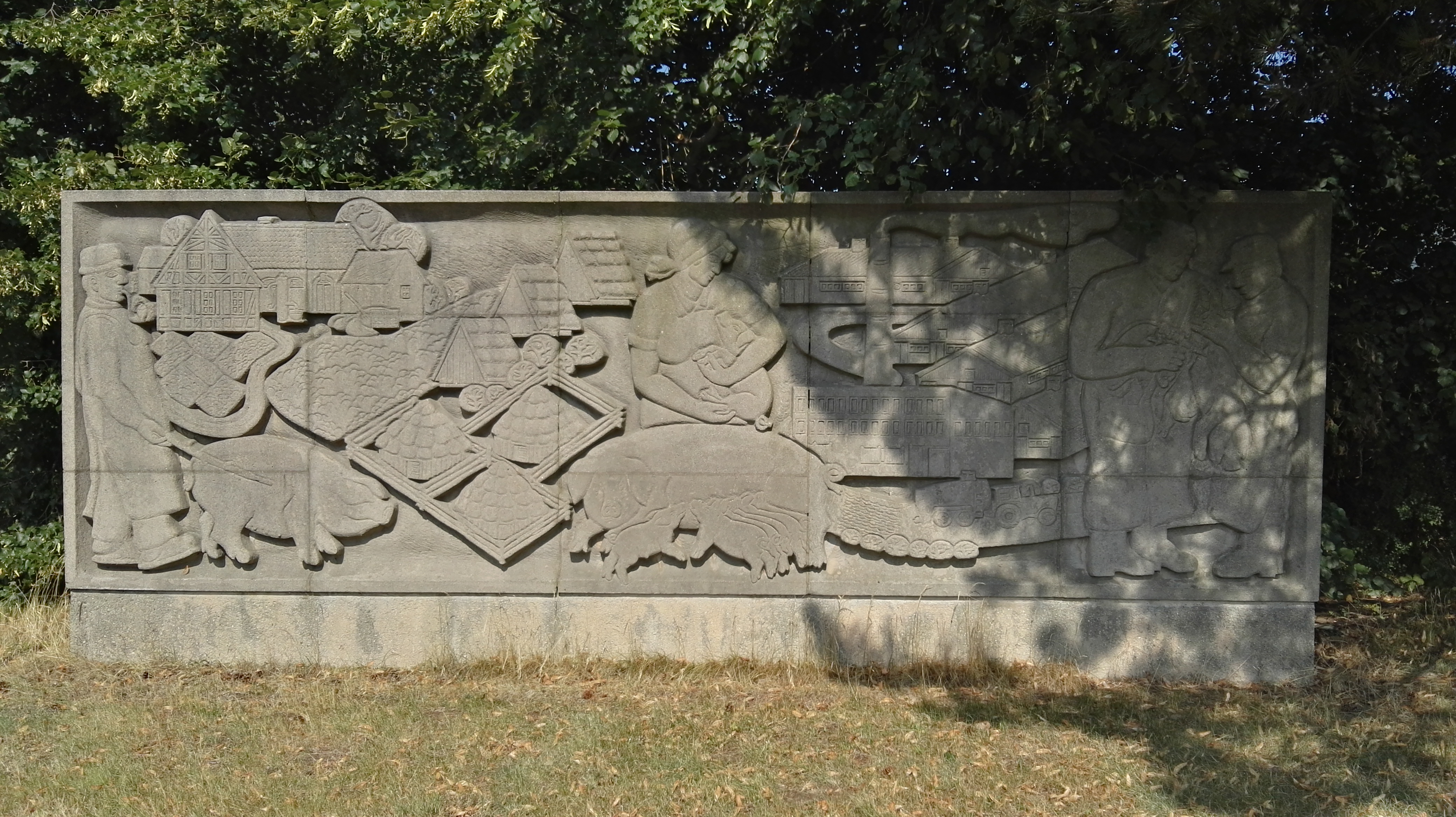 Reliefwand Schweinezucht im Schweinezuchtbetrieb (an der Radeburger Straße 220) Dresden-Wilschdorf, 1979, vom Dresdner Bildhauer Eberhard Wolf